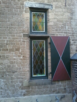 Querstockfenster am Gotischen Haus in der Brückstraße